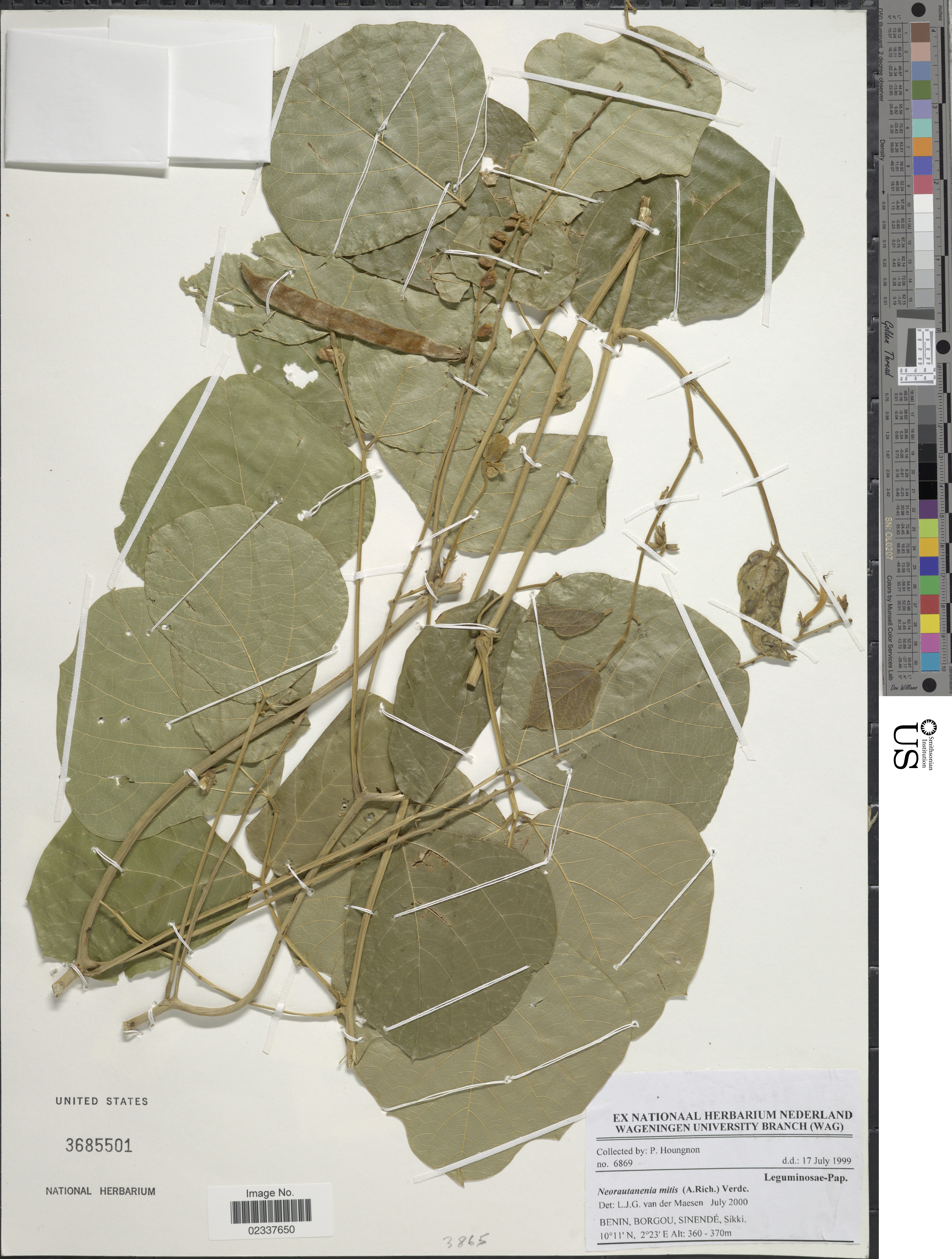 Neorautanenia mitis (A. Rich.) Verdc. Object Details Biogeographical Region 22 - West Tropical Africa Collector P. Houngnon Max. Elevation 370 Min. Elevation 360 Record Last Modified 2 Nov 2017 Specimen Count 1 Collection Date 17 Jul 1999 Barcode 02337650 USNM Number 3685501 Place Benin, Borgou, Sinende, Sikki, Benin, Africa Published Name Neorautanenia mitis (A. Rich.) Verdc. Taxonomy Plantae Dicotyledonae Rosales Fabaceae Faboideae NMNH - Botany Dept. Record ID nmnhbotany_13636127 Usage of Metadata (Object Detail Text) CC0 GUID (Link to Original Record)